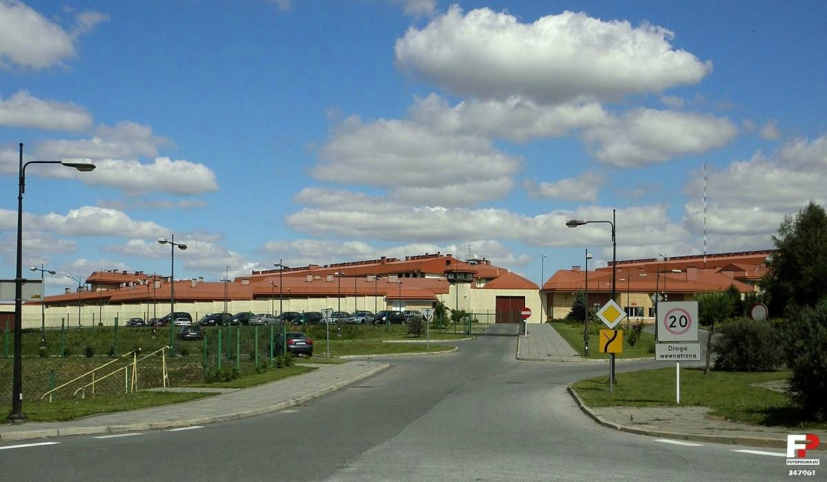 Areszt Śledczy Radom.